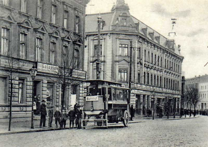 O-Bus in Eberswalde 1901 (erster Einsatz im Deutschen Reich)